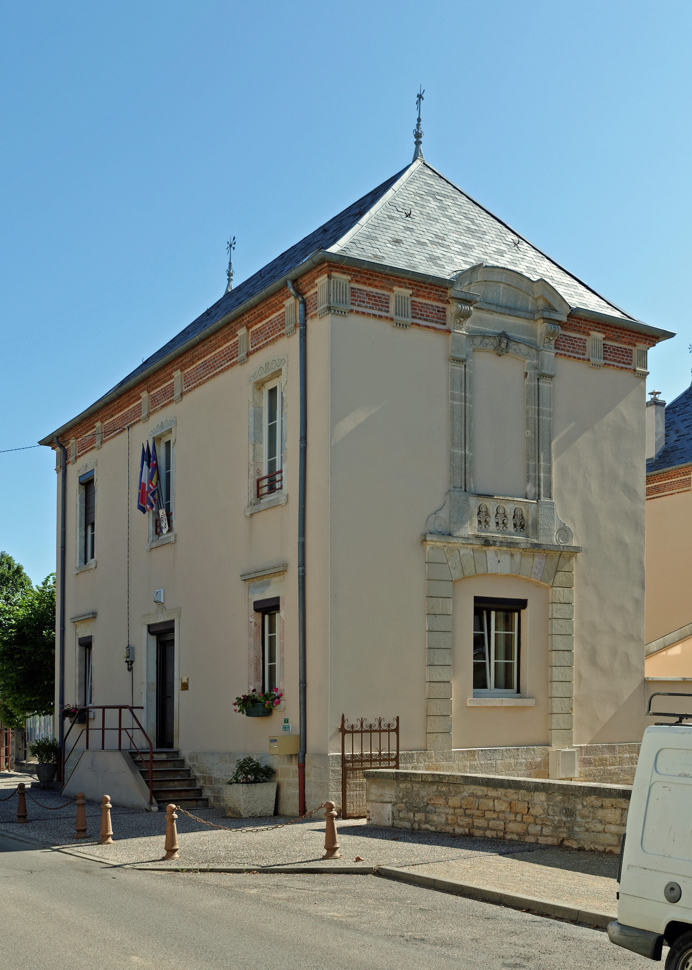 Mairie de Longchamp. (Longchamp, Côte d'Or, Bourgogne, France)